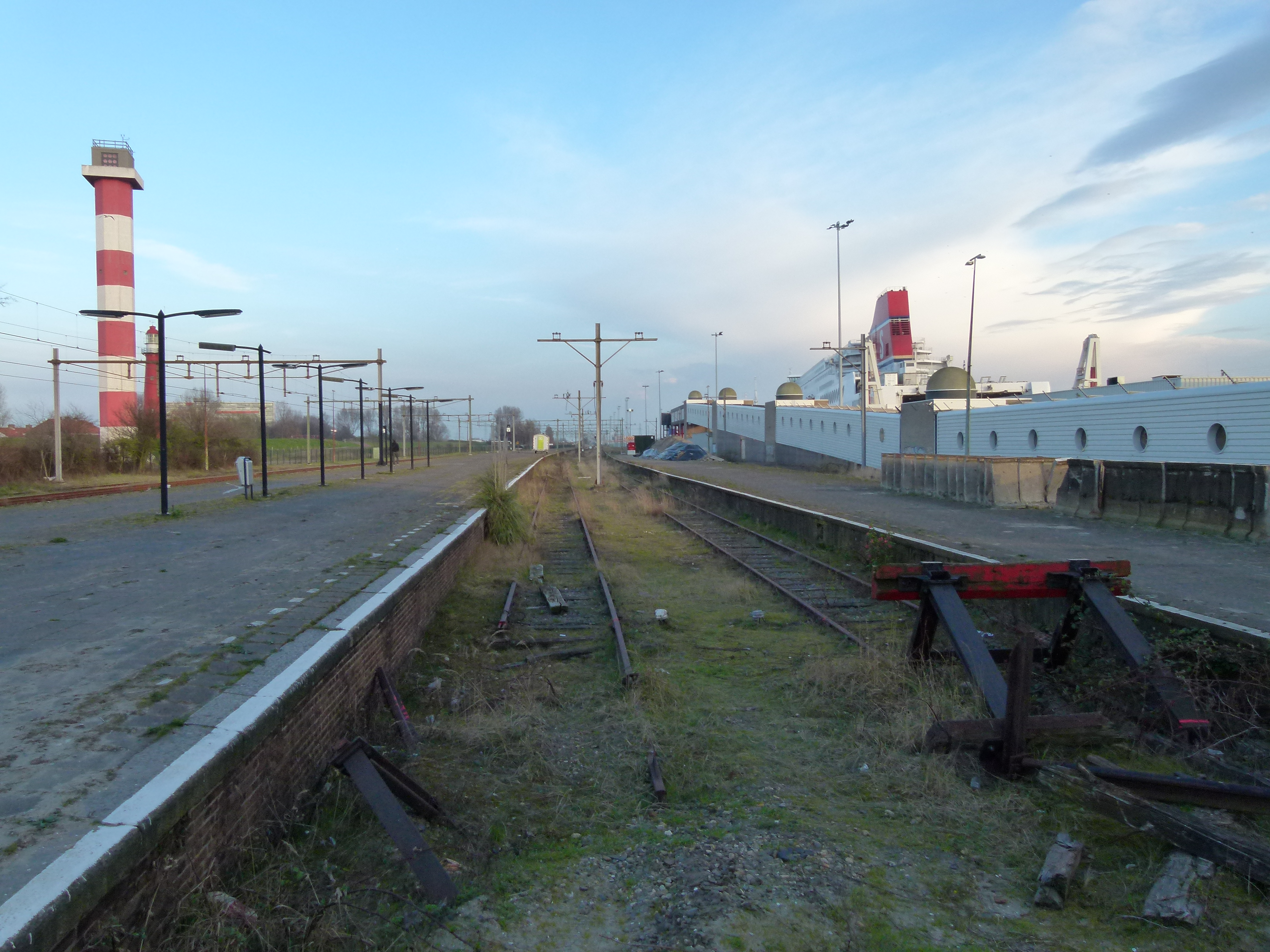 Station Hoek van Holland Haven, kopsporen voor internationale treinen (foto: Daniel van der Ree)